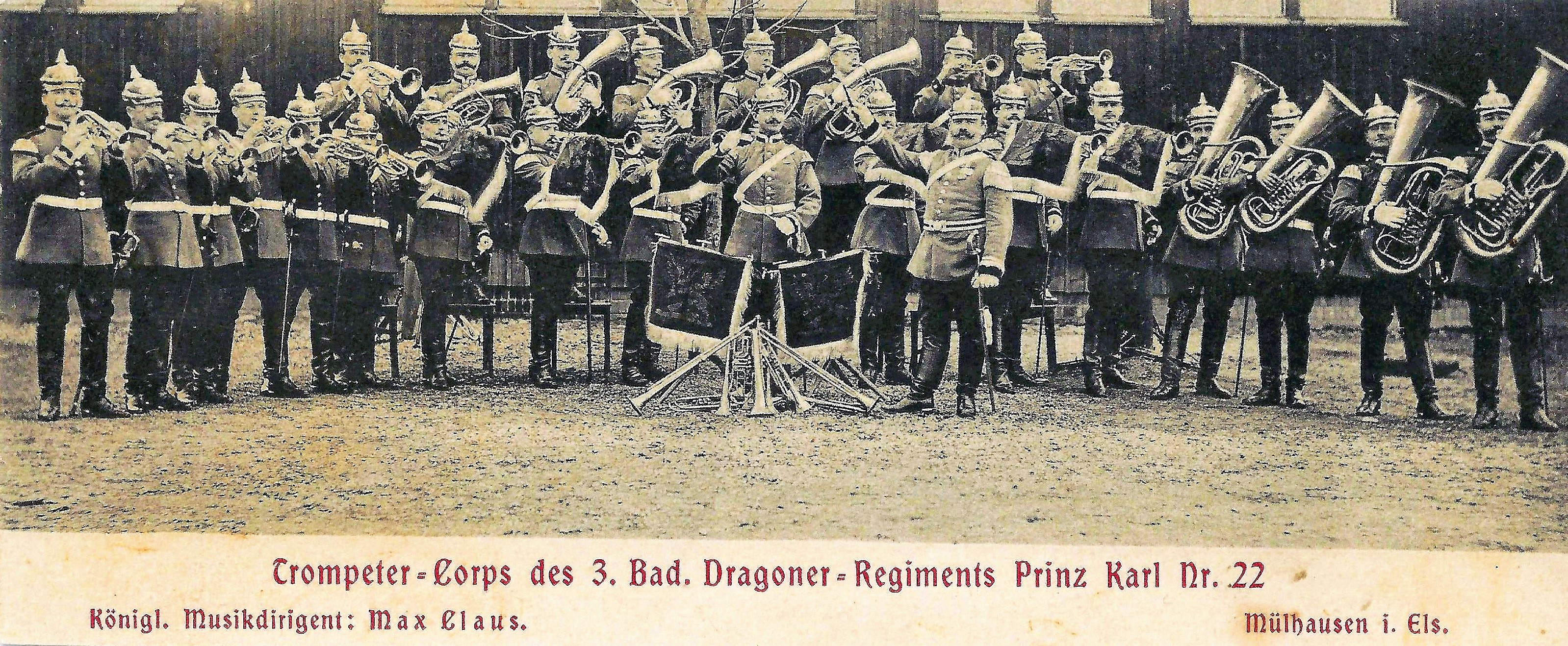 3. Badisches Dragoner-Regiment "Prinz Karl" Nr.22